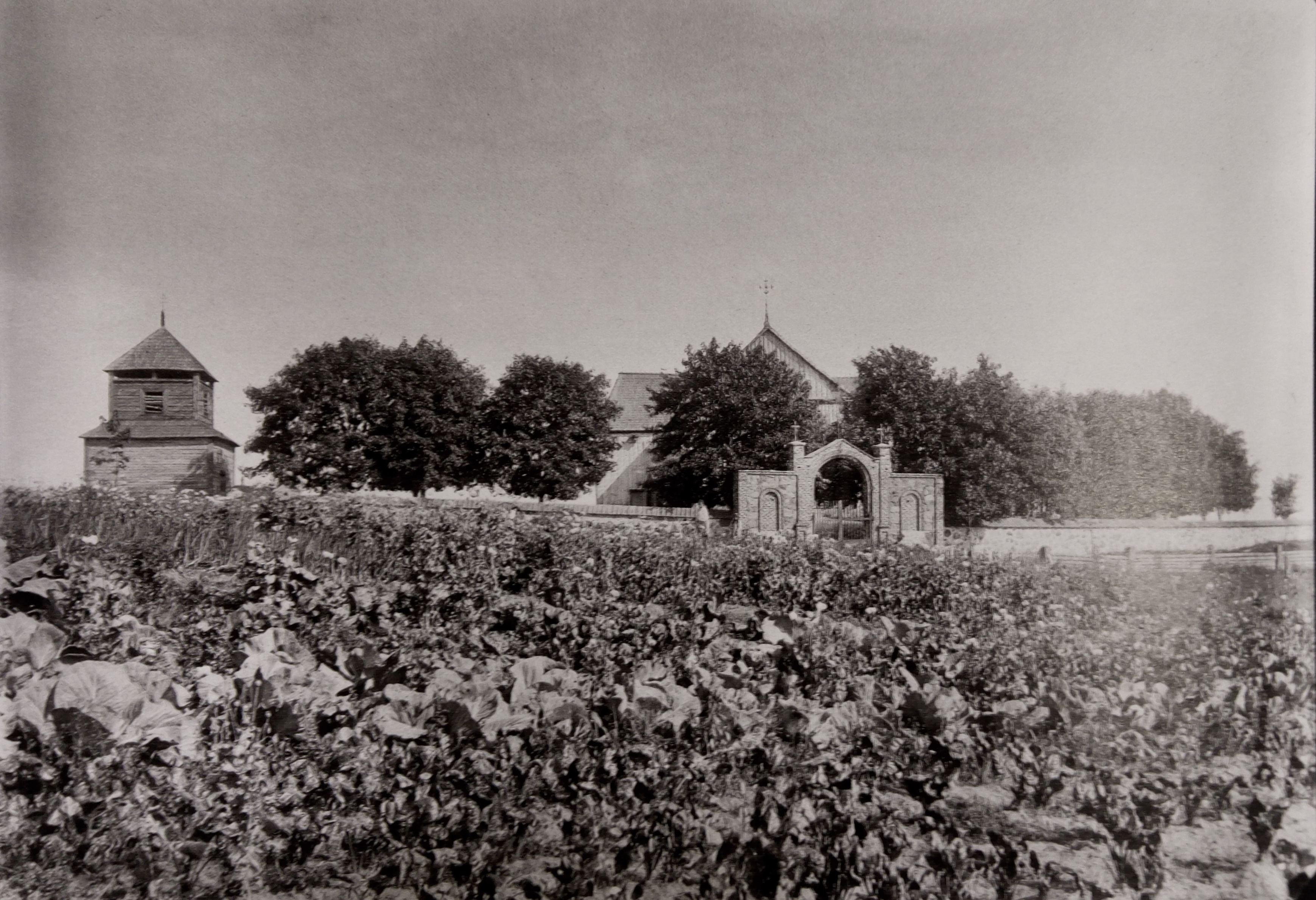 Veprių senosios bažnyčios vaizdas 19 a. pabaigoje. Fotografija galimai daryta Vaitkuškio dvarininko Stanislovo Kosakovskio ir yra seniausias žinomas Veprių bažnyčios atvaizdas.